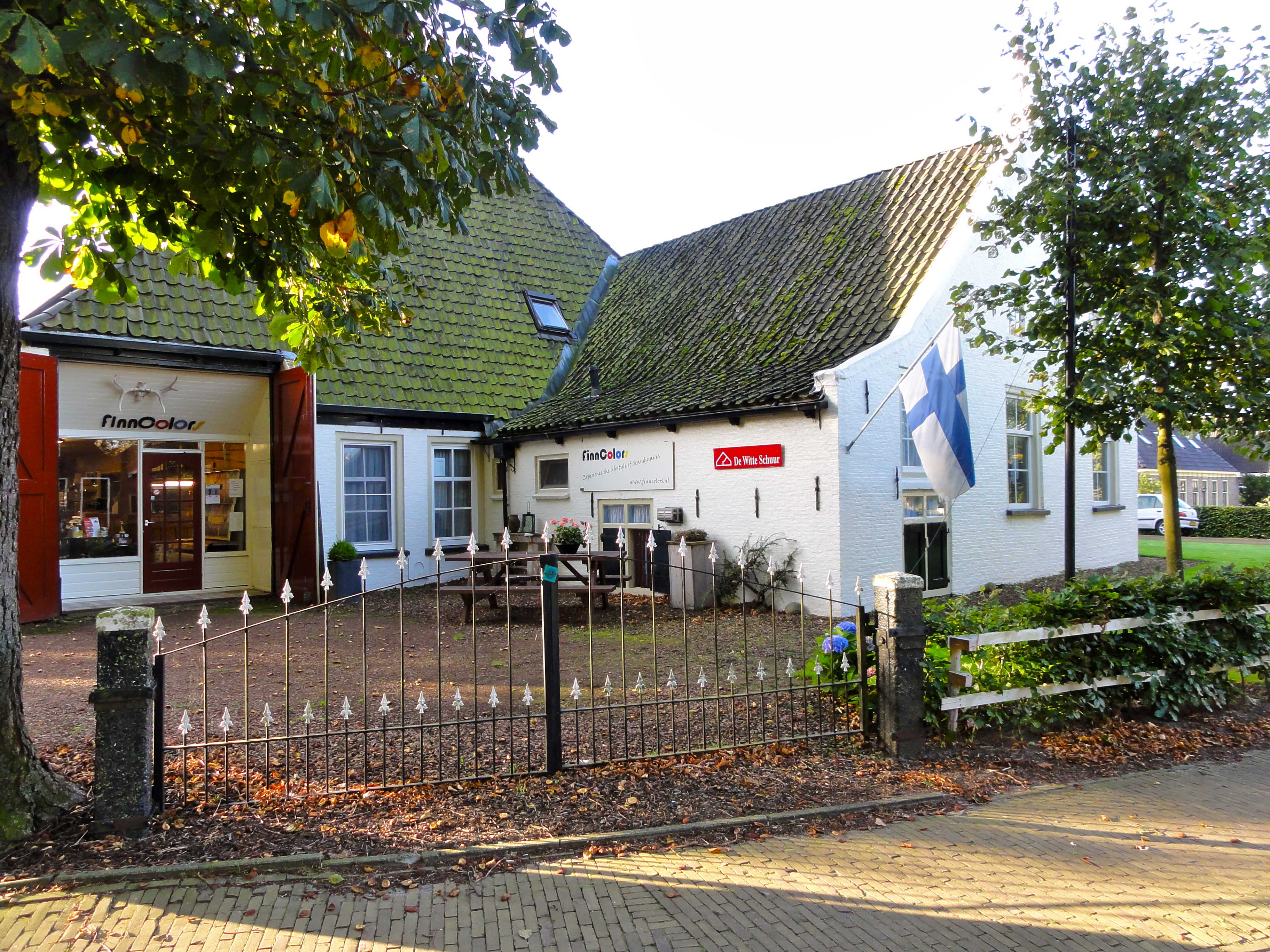 De Witte Schuur aan de Stinsenwei in Harich